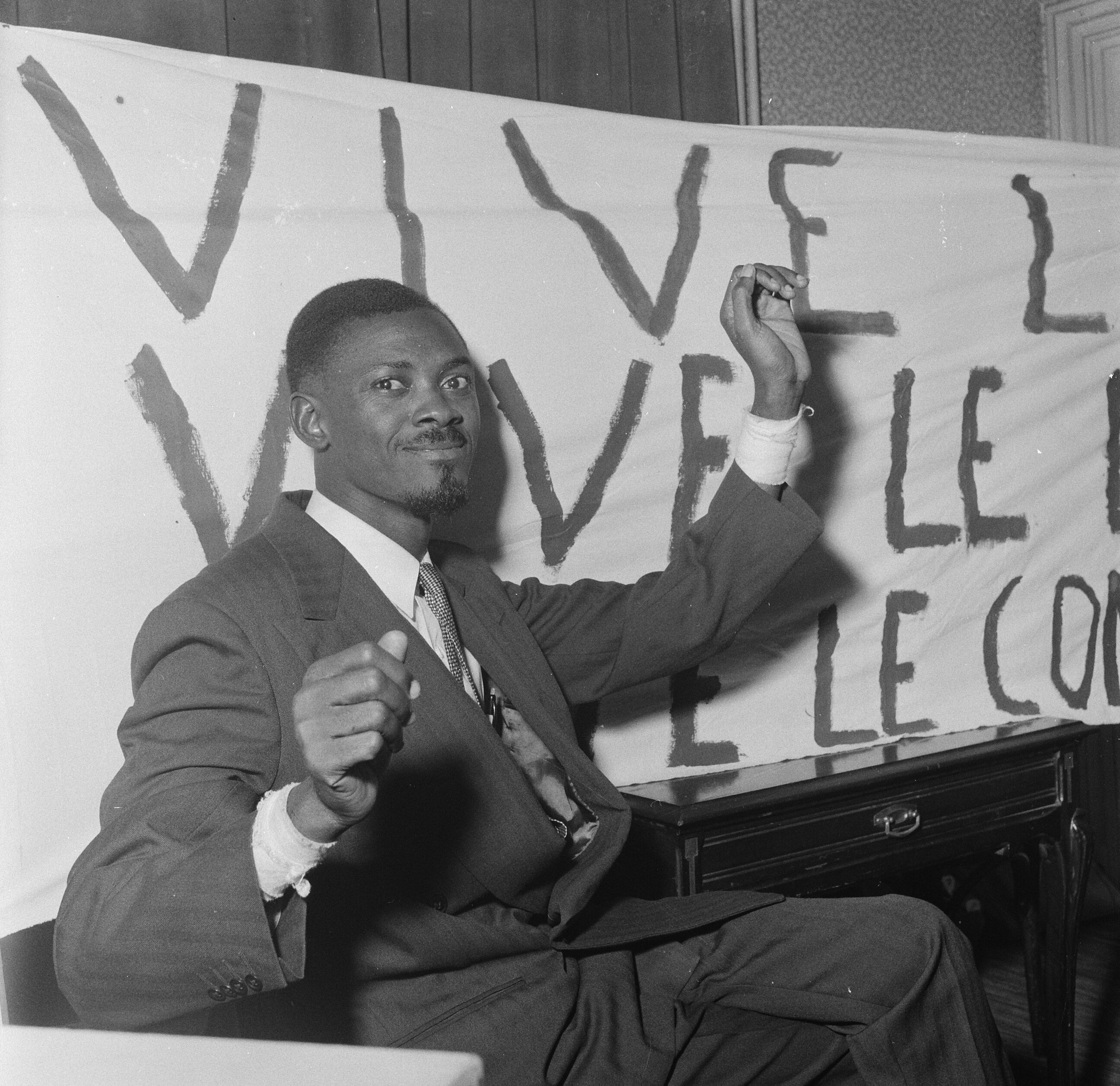 De Congolese leider Patrice Loemoemba in Brussel Datum 26 januari 1960 Locatie België, Brussel